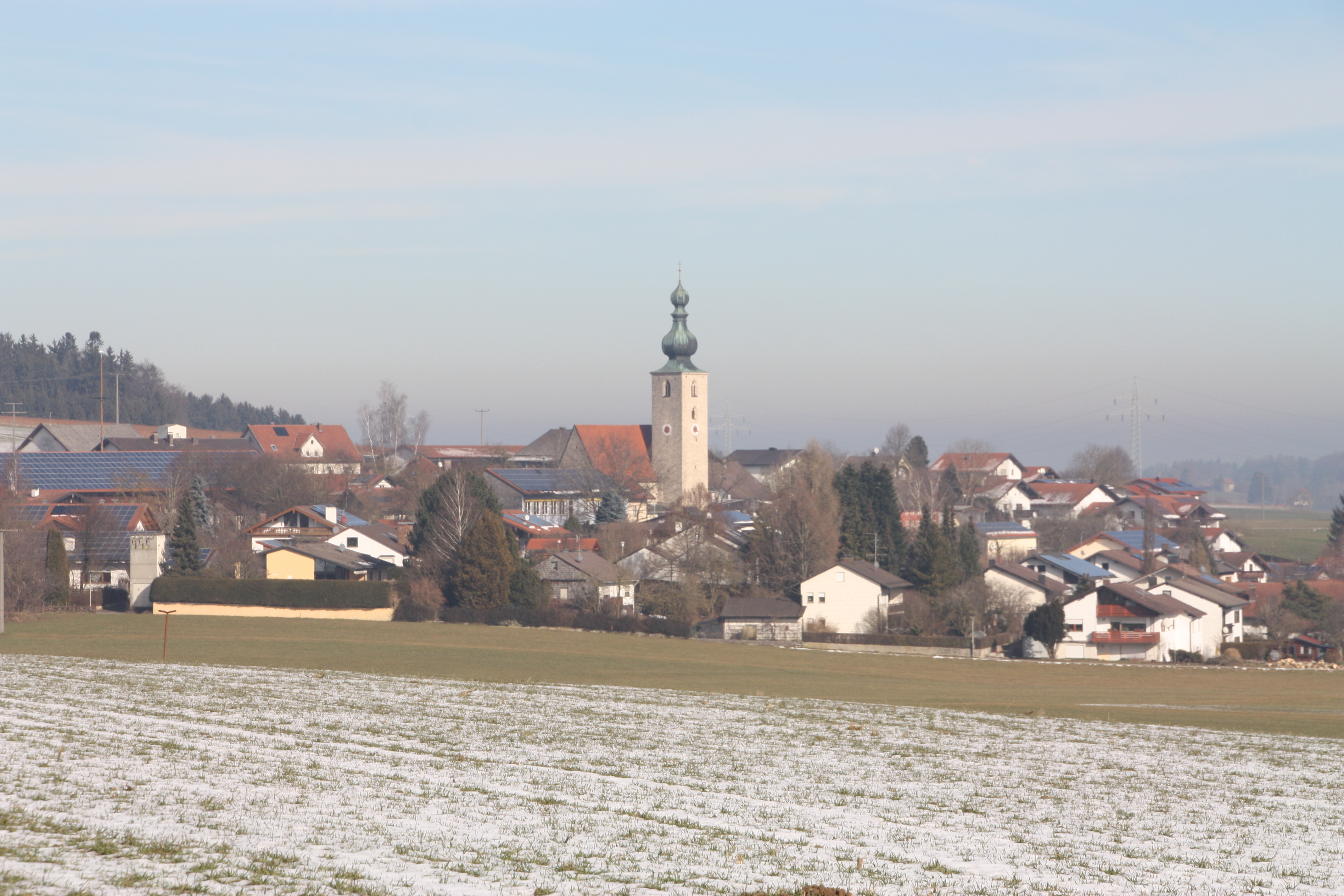 Tyrlaching